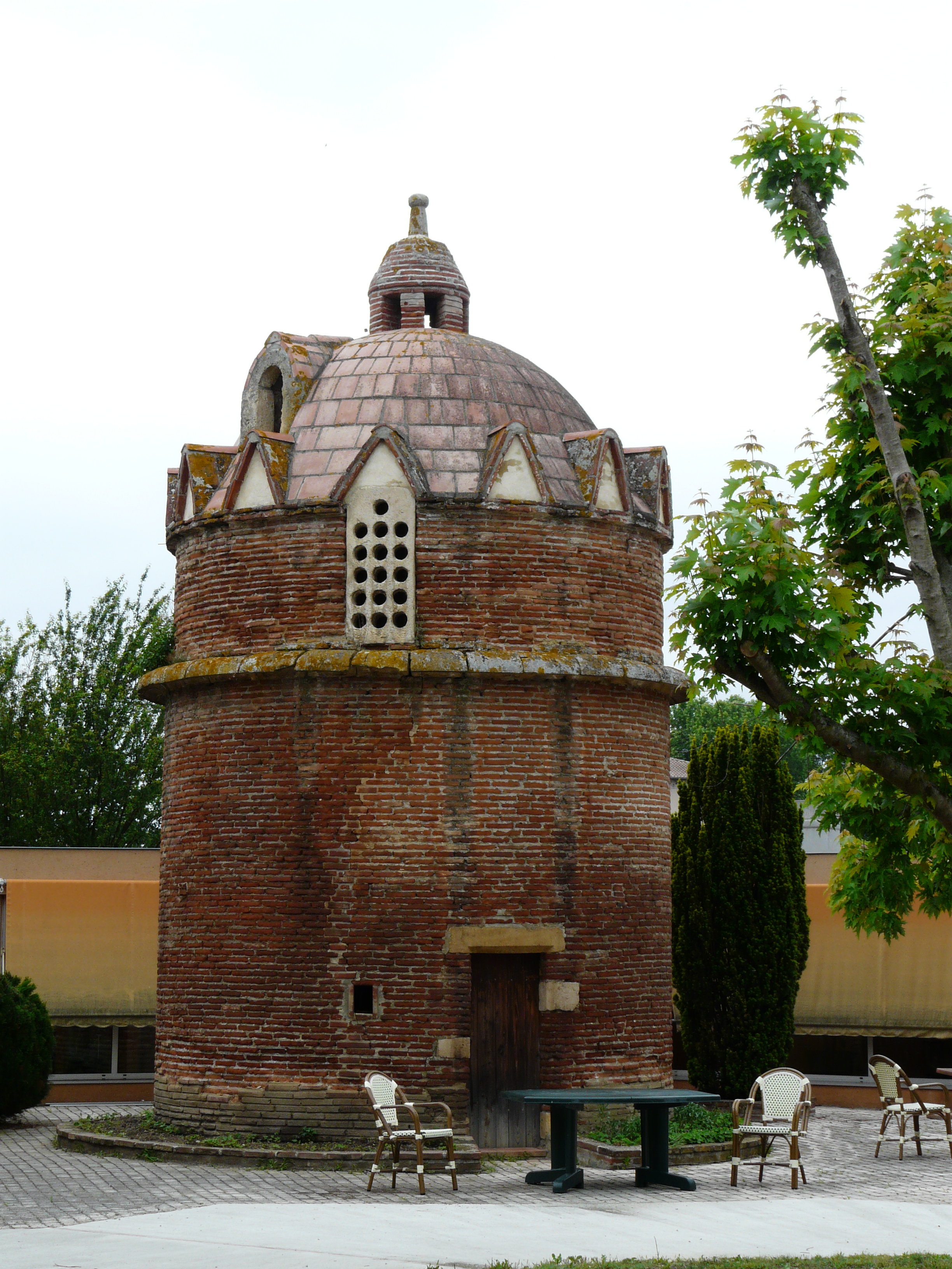 Le colombier du Grilhon, Carbonne, Haute-Garonne, France.